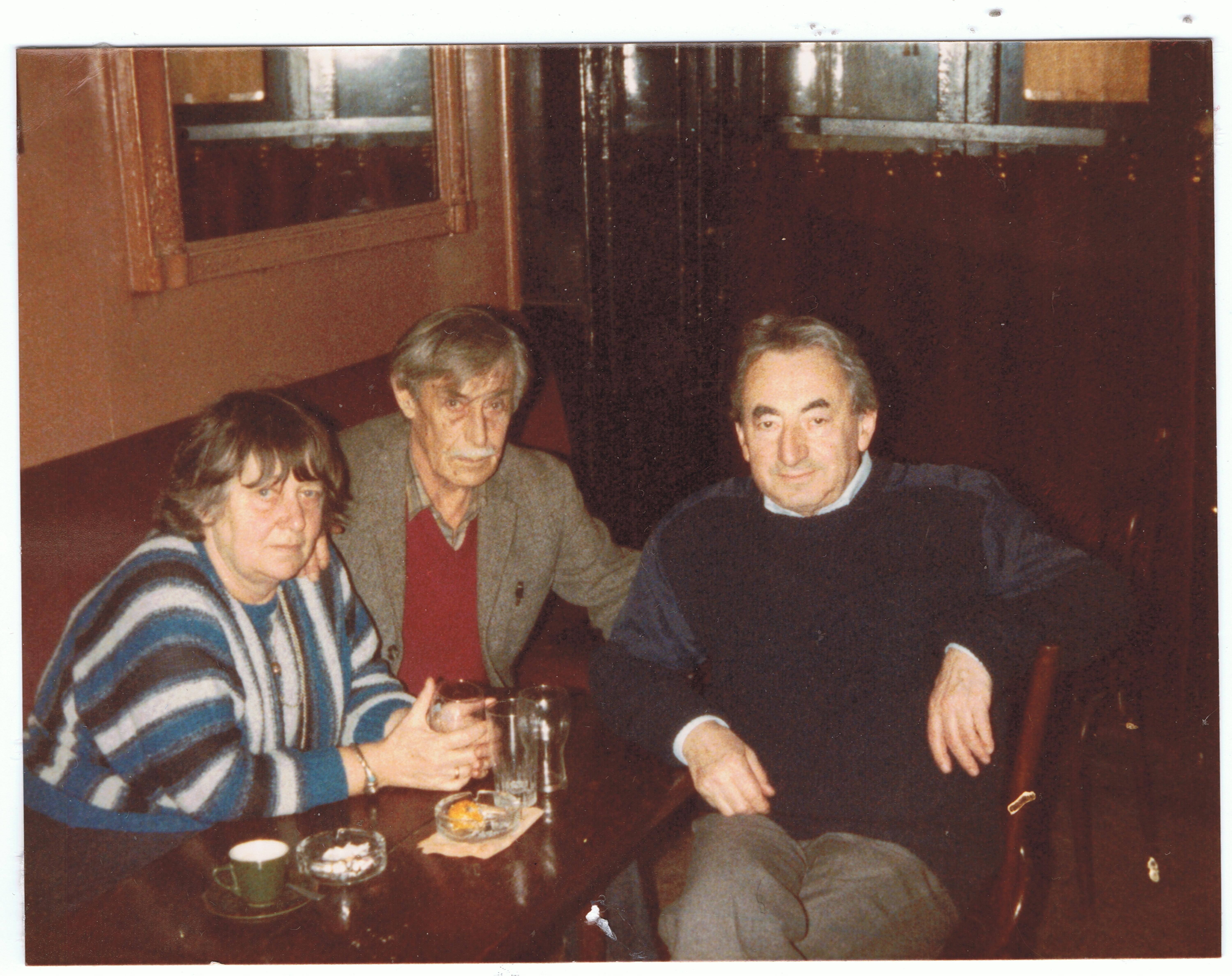 Лилиана Лунгина, Виктор Некрасов, Семен Лунгин, Париж, 1985.